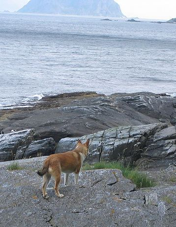 Норвежский лундехунд на фоне пейзажа